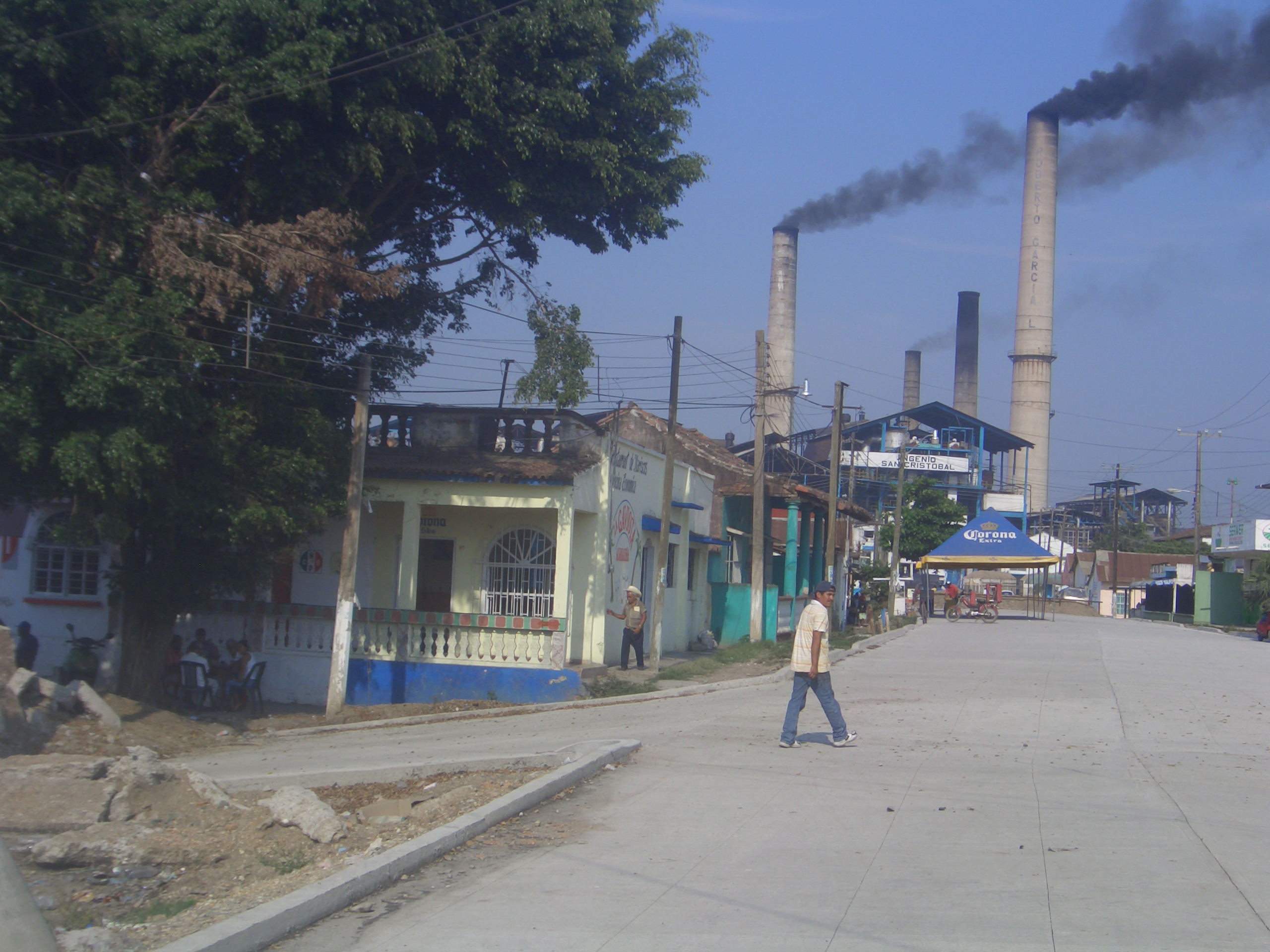 Calle Colon y al fondo el ingenio San Cristobal, Ver.